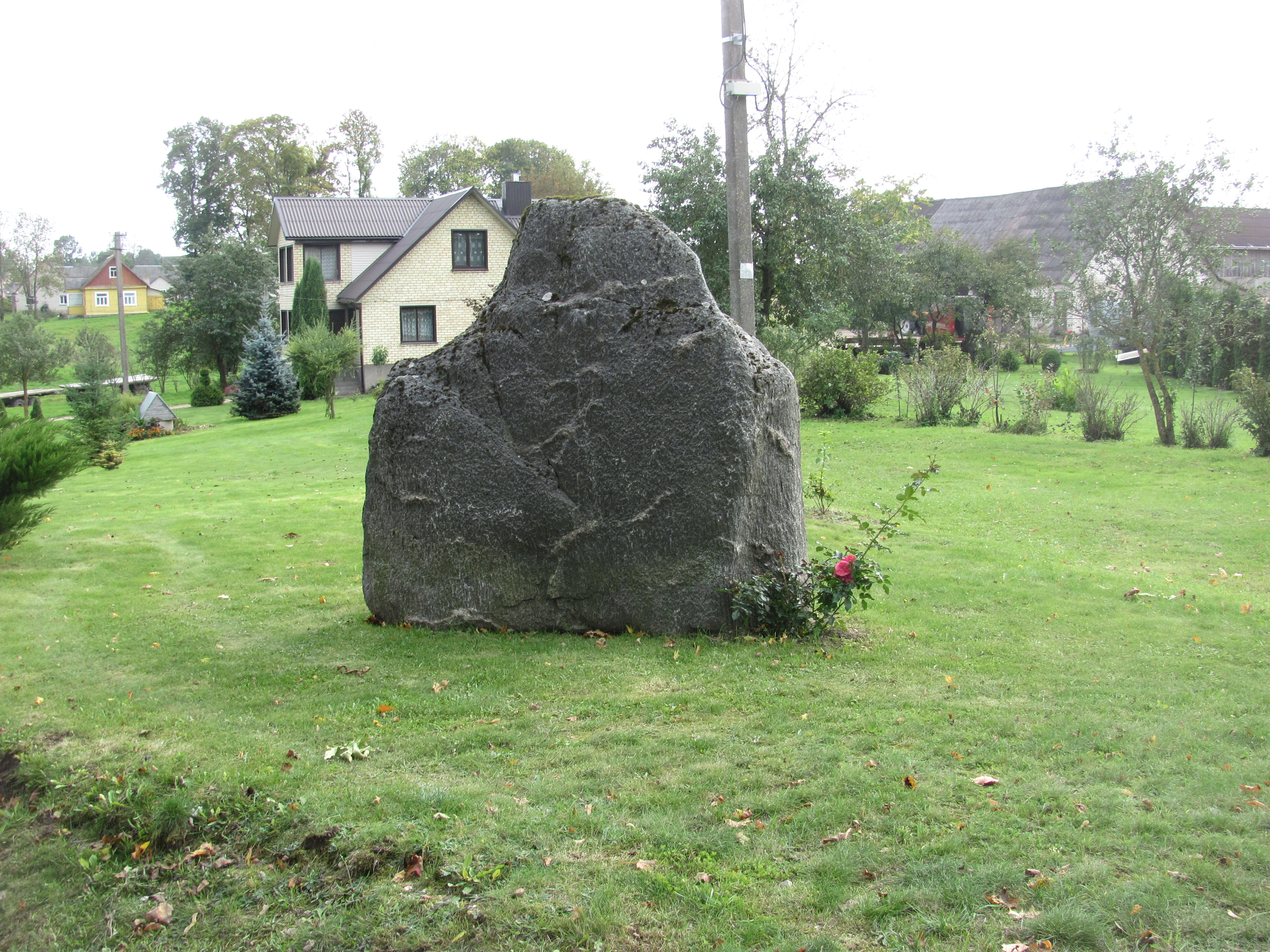 Sėlė 28310, Lithuania